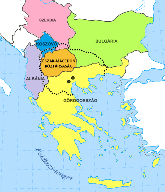 Makedónia régió térképe.